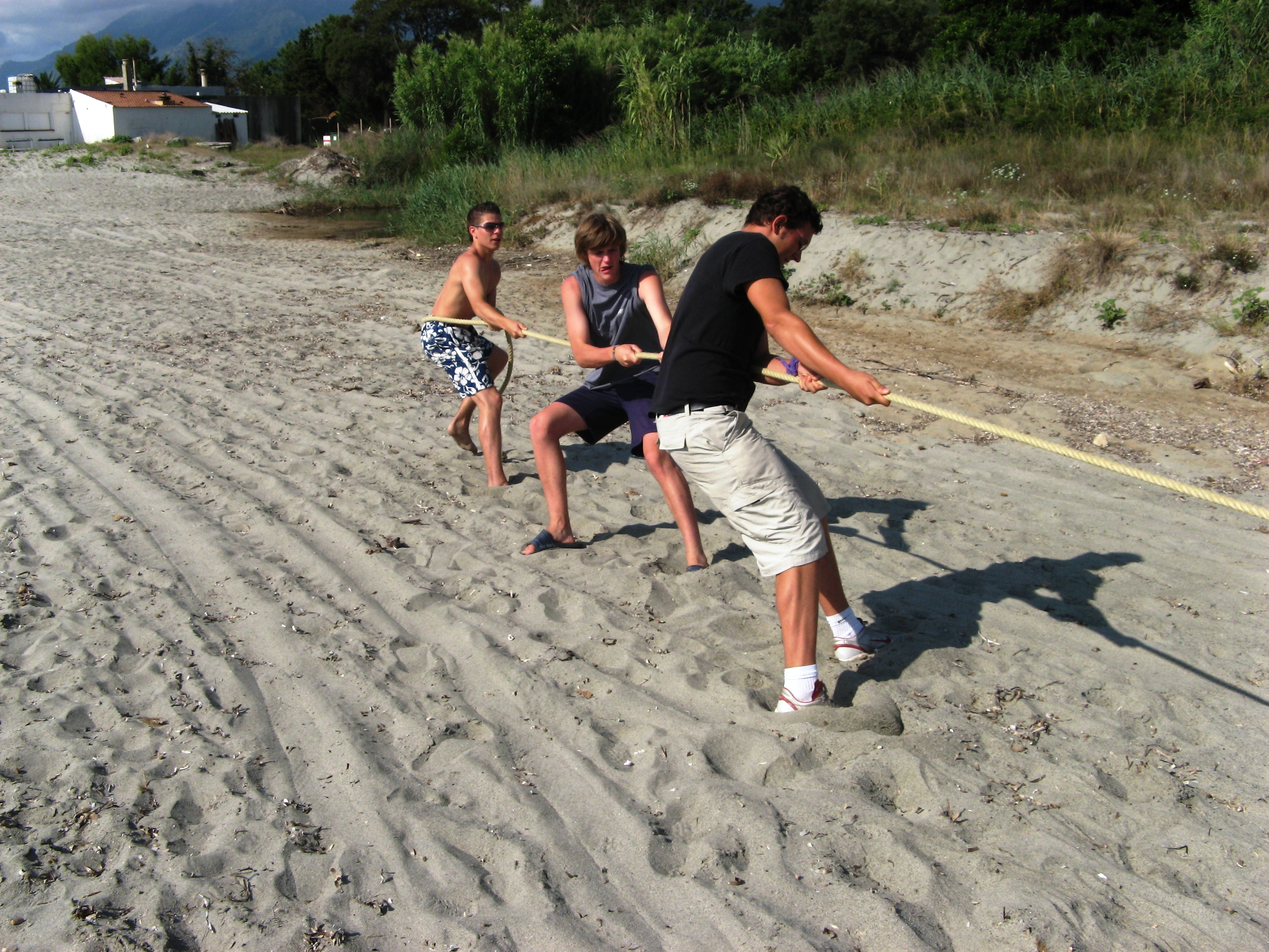 Ik (rechts) aan het touwtrekken op het Corsicaans strand. Foto gemaakt door Wouter Opdenacker